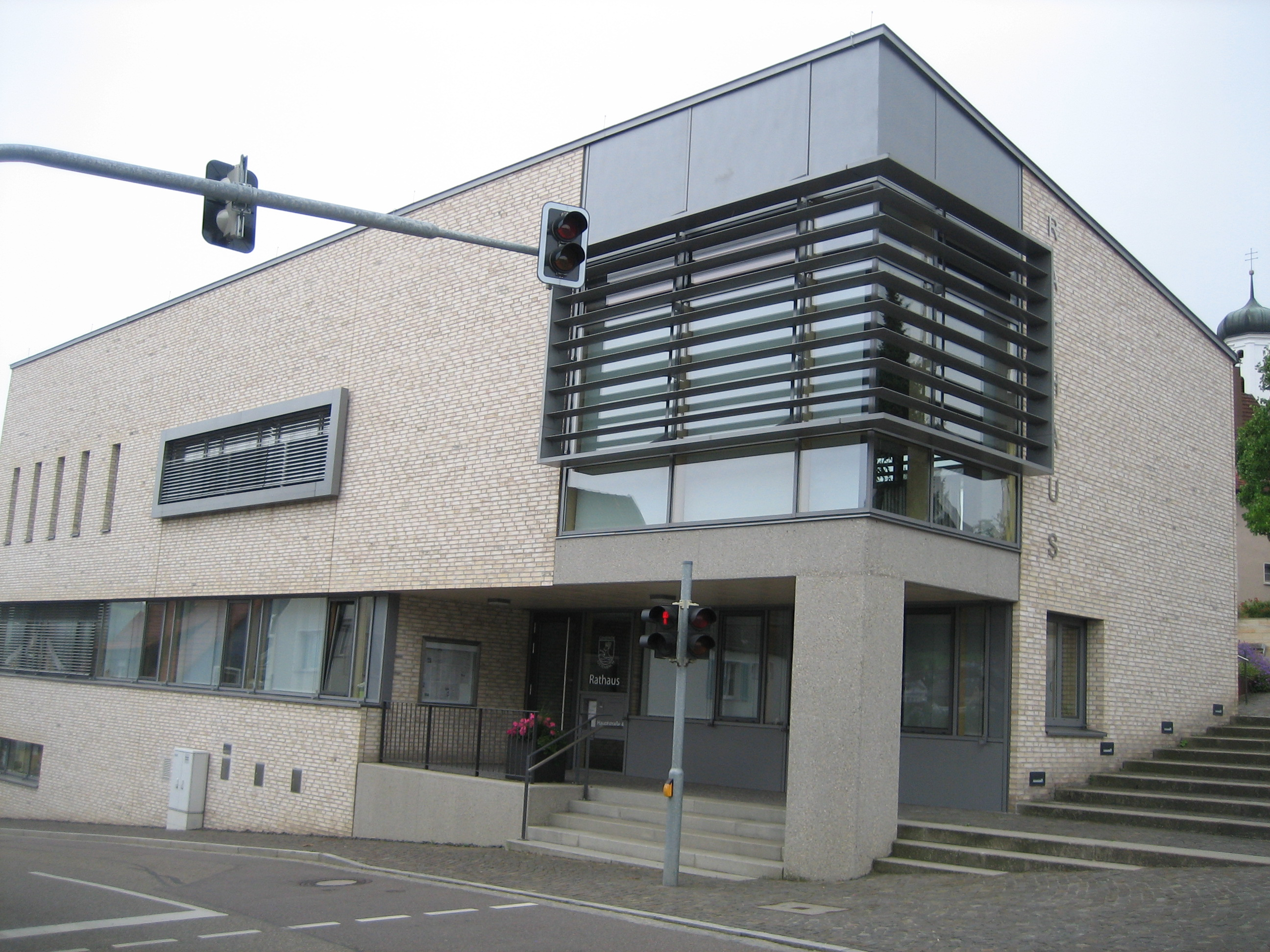 Rathaus Ottenbach Kreis Göppingen